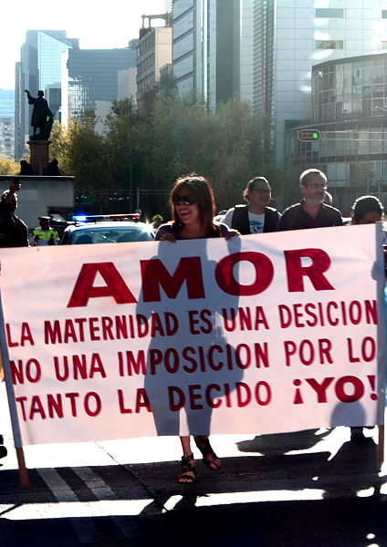 Feministas marcharon del Monumento a la madre al Zócalo de la Ciudad de México para exigir el aborto se legalice en todo el país.